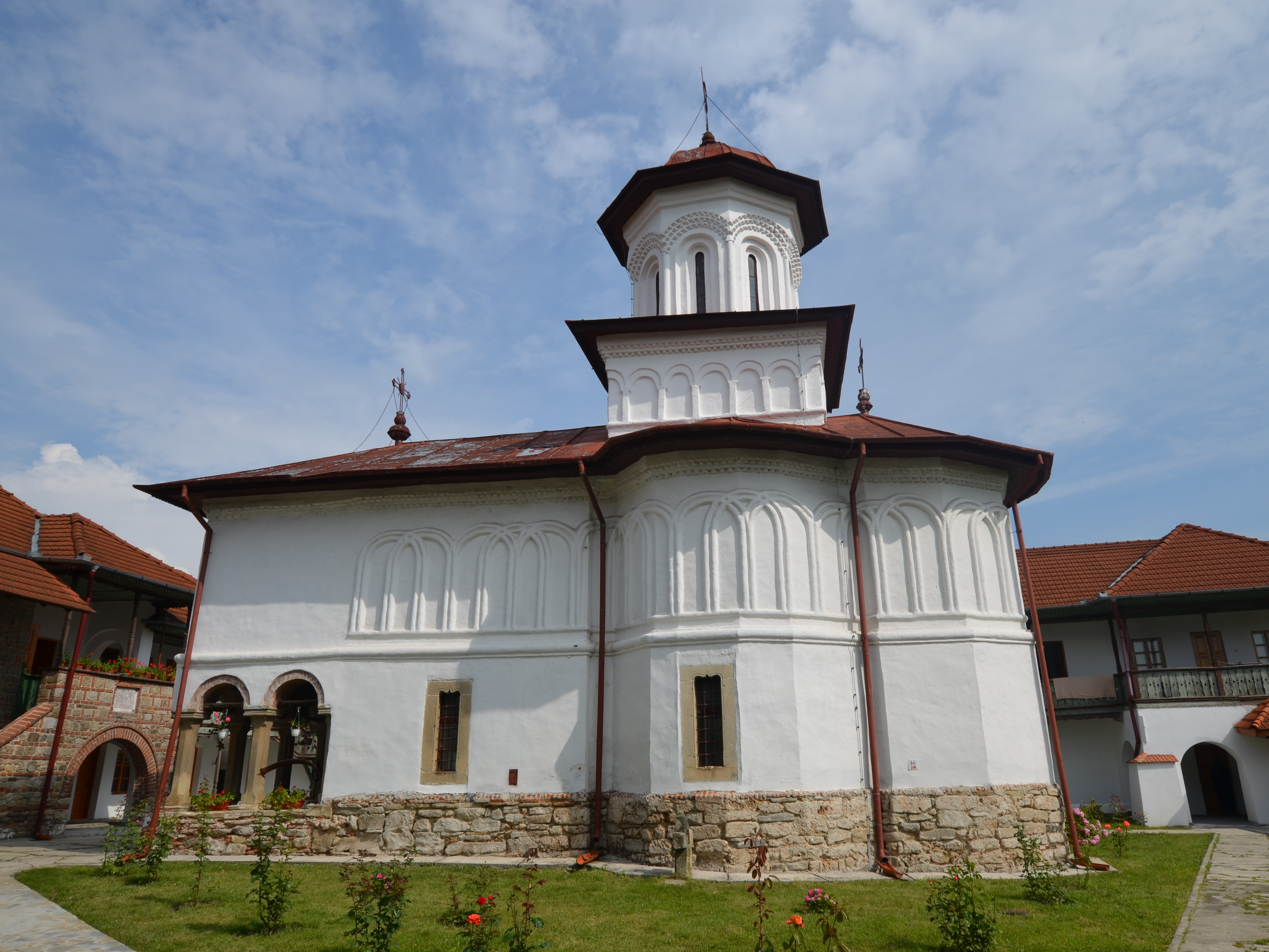 Mănăstirea Sărăcinești - Biserica "Adormirea Maicii Domnului" - vedere dinspre sud 01